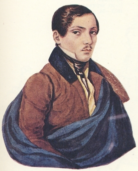 Святосла́в Афана́сьевич Рае́вский (6 июня 1808 года, Санкт-Петербург — 1876, Санкт-Петербург) — государственный чиновник, литератор, этнограф, близкий друг поэта М. Ю. Лермонтова.